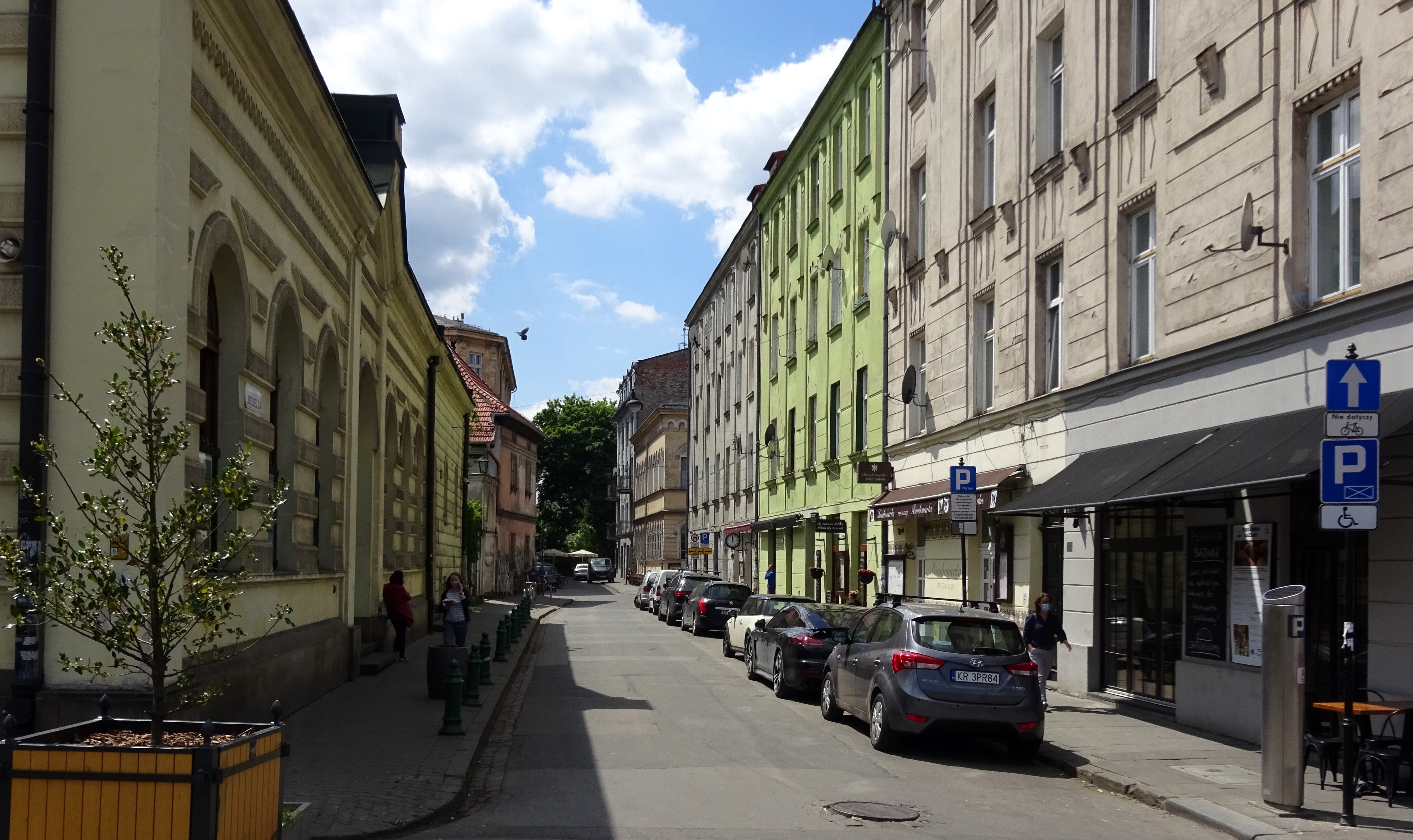 Ulica Meiselsa w Krakowie. Widok z Placu Nowego na zachód.